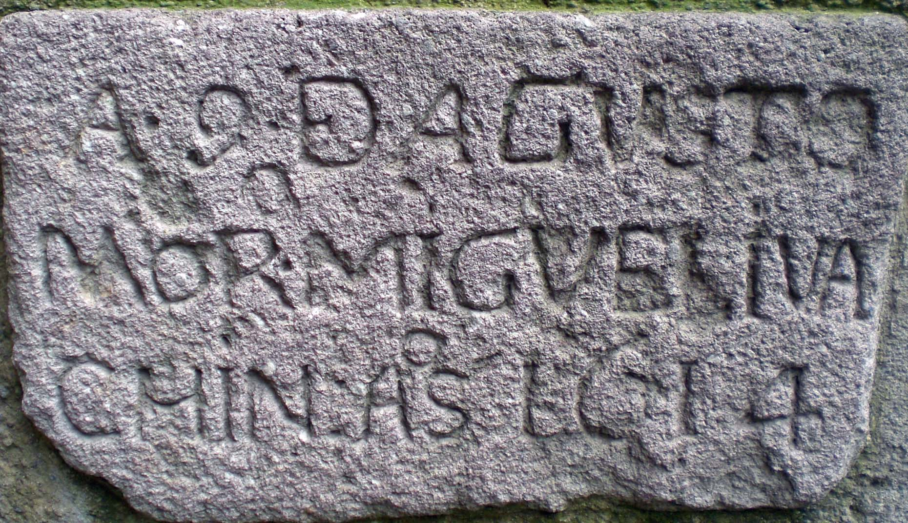 Inscripción en piedra de la fecha - Templo San Jacinto, San Ángel, DF, México